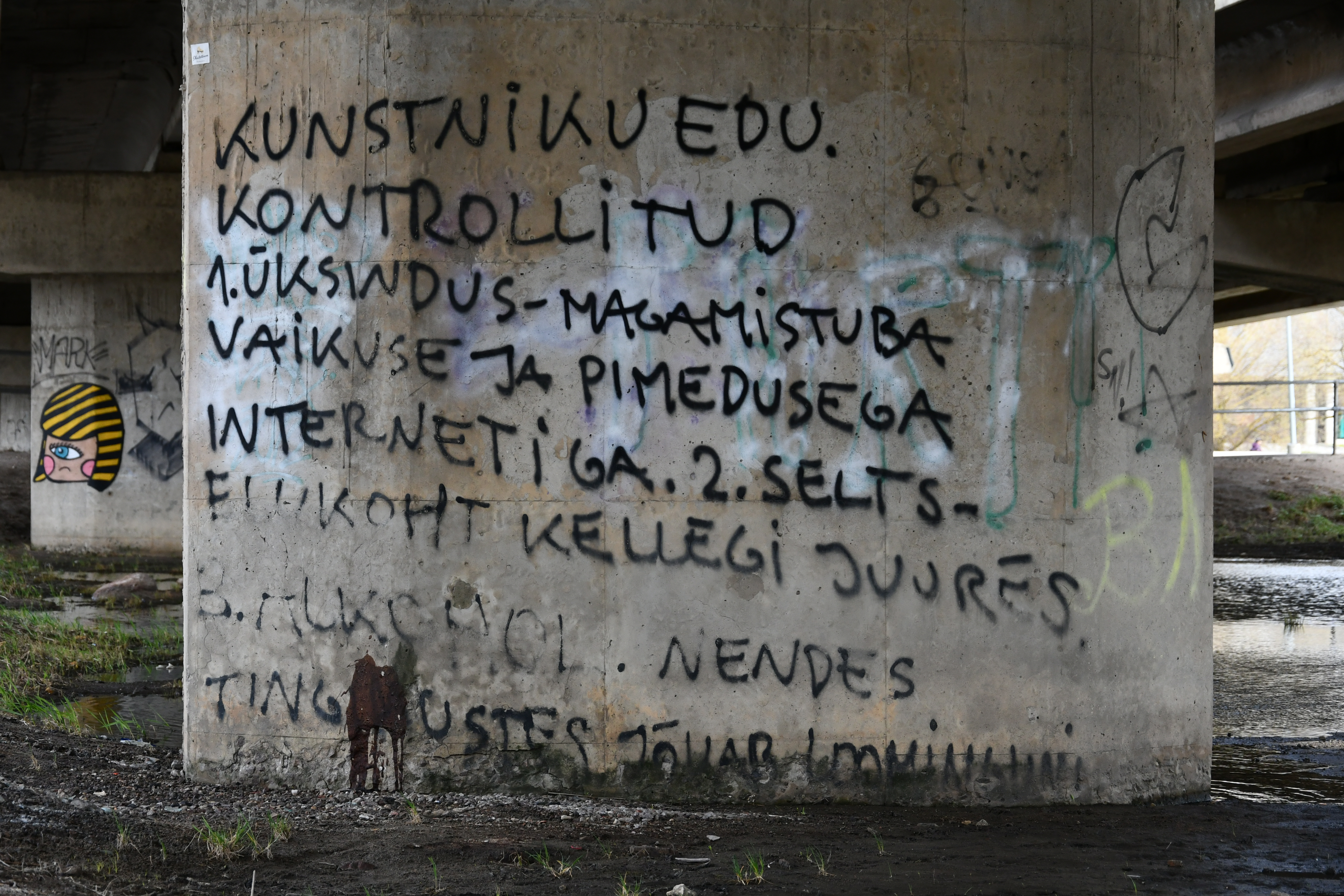 Ülo Kiple loomingust inspireeritud grafiti Sõpruse silla all Tartus